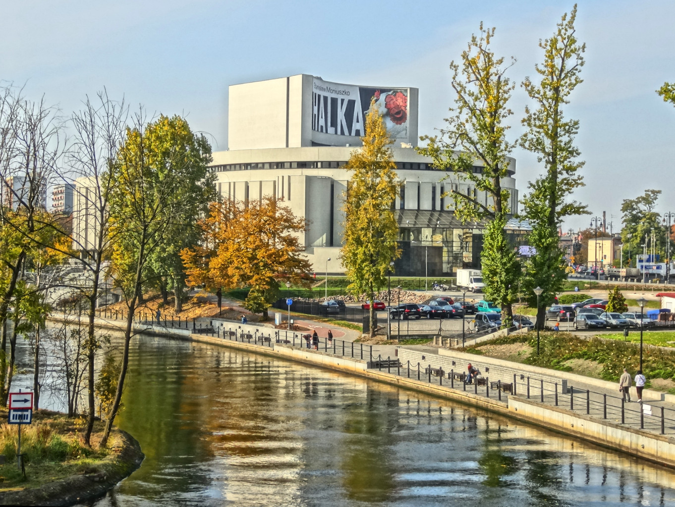 Widok z mostu Staromiejskiego im. Jerzego Sulimy-Kamińskiego w Bydgoszczy